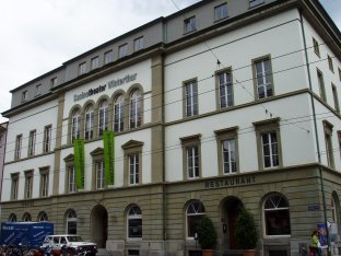 Casinotheater Winterthur